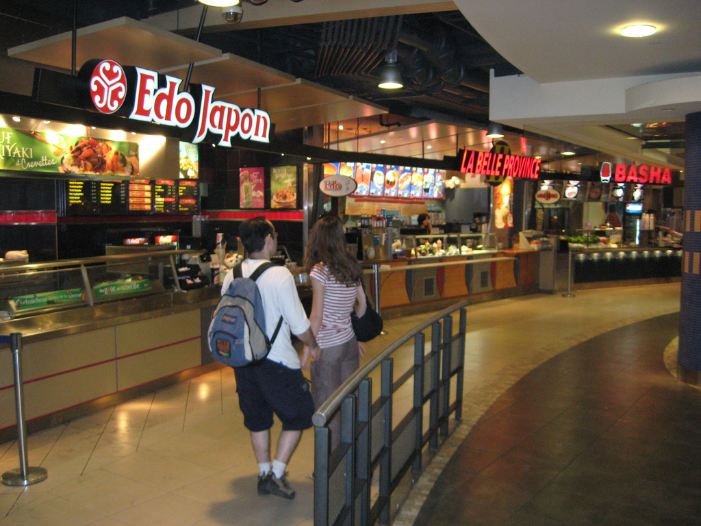 Even een typische term introduceren uit Canda: Food Court. Na Geniale Concepten als de Subway (voor al je gezonde ontbijten en lunches), Tim Hortons (voor de iets minder gezonde ontbijten en lunches, die echter wel enige hartigheid bevatten waardoor de konijnfactor iets minder wordt) en de Starbucks (uw dagelijkse slappe bakkie koffie) die je op elke straathoek kan vinden, bevat hier elk winkelcentrum een Food Court. Voor de Europeaan een nieuw verschijnsel, poging tot uitleg: je hebt een heel groot ondergronds plein met tafels en stoeltjes, daarom heen zitten meer dan twintig kleine afhaalbalies, waar je van elke cultuur ter wereld voor een schamel bedrag (iets meer dan 10 CAD, ongeveer 7 euro) een goede maaltijd en kleine (= groot genoeg) Cola kan halen. Fijn concept! Vooral omdat de restaurantjes vrij duur zijn, en fast food al vanaf de tweede dag geen optie meer is. Het scheelt ook kiezen: iedereen kan halen wat hij wil, en het eten is snel en van goede kwaliteit. Hulde!